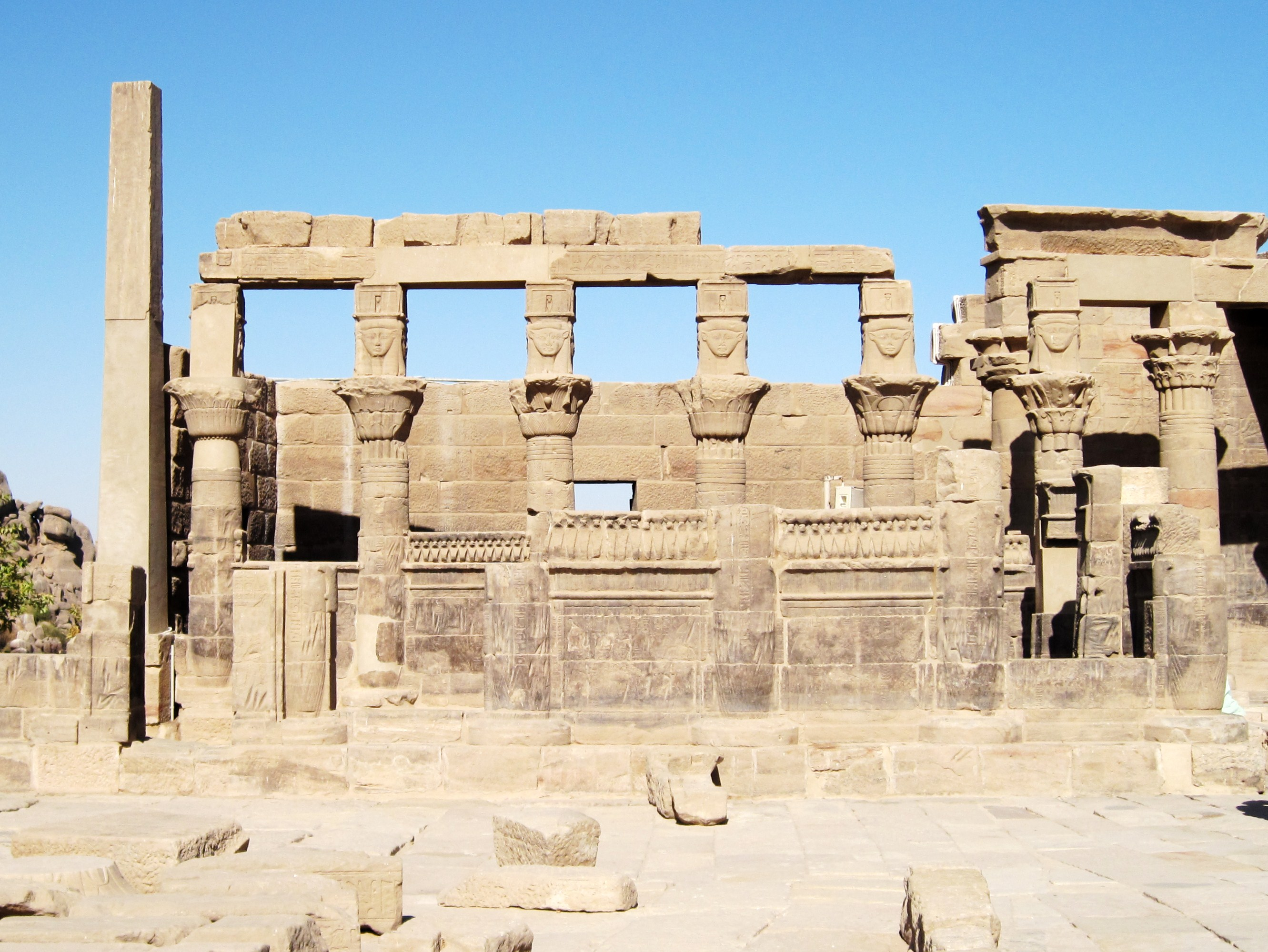 Kiosk des Nektanebos I. vor dem Isis-Tempel von Philae auf der Insel Agilkia, Ägypten